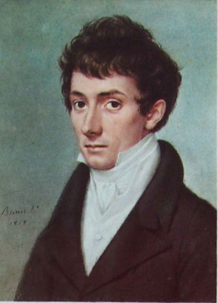 Ritratto di Tommaso Grossi (1790-1853)